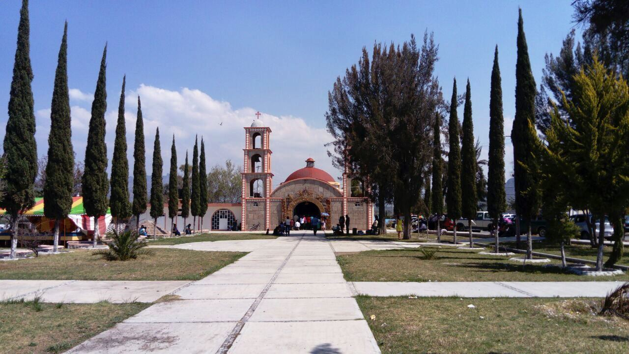 Colonia Cuauhtémoc en Actopan, Hidalgo, México.